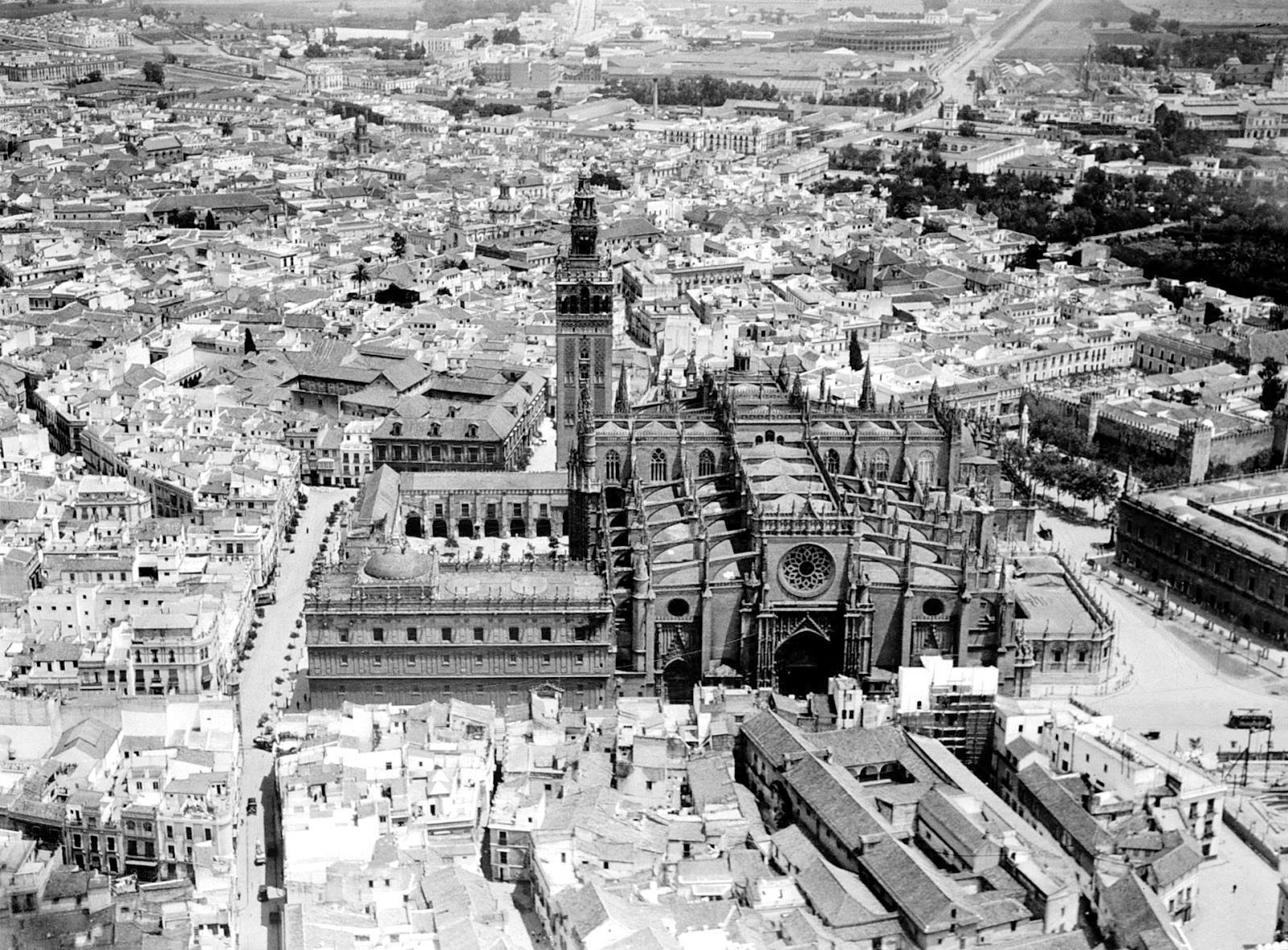 Vista de la catedral de Sevilla y la Giralda.